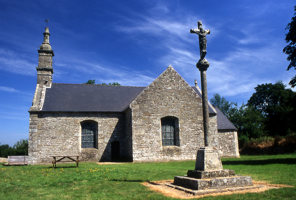 Bulat-Pestivien - Chapelle Saint-Anne Radenek. .